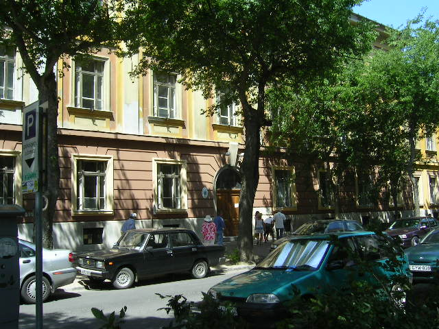 Boronkay György Középiskola régi épülete, Vác (Konstantin tér)